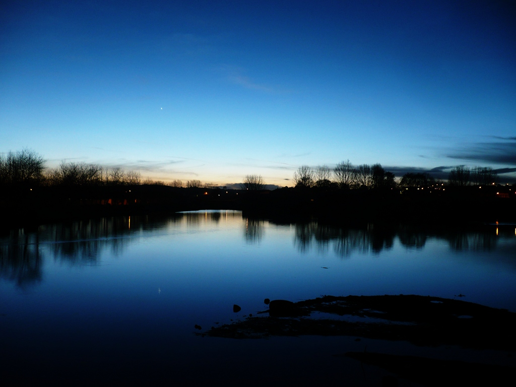 Crepúsculo en Guachochi